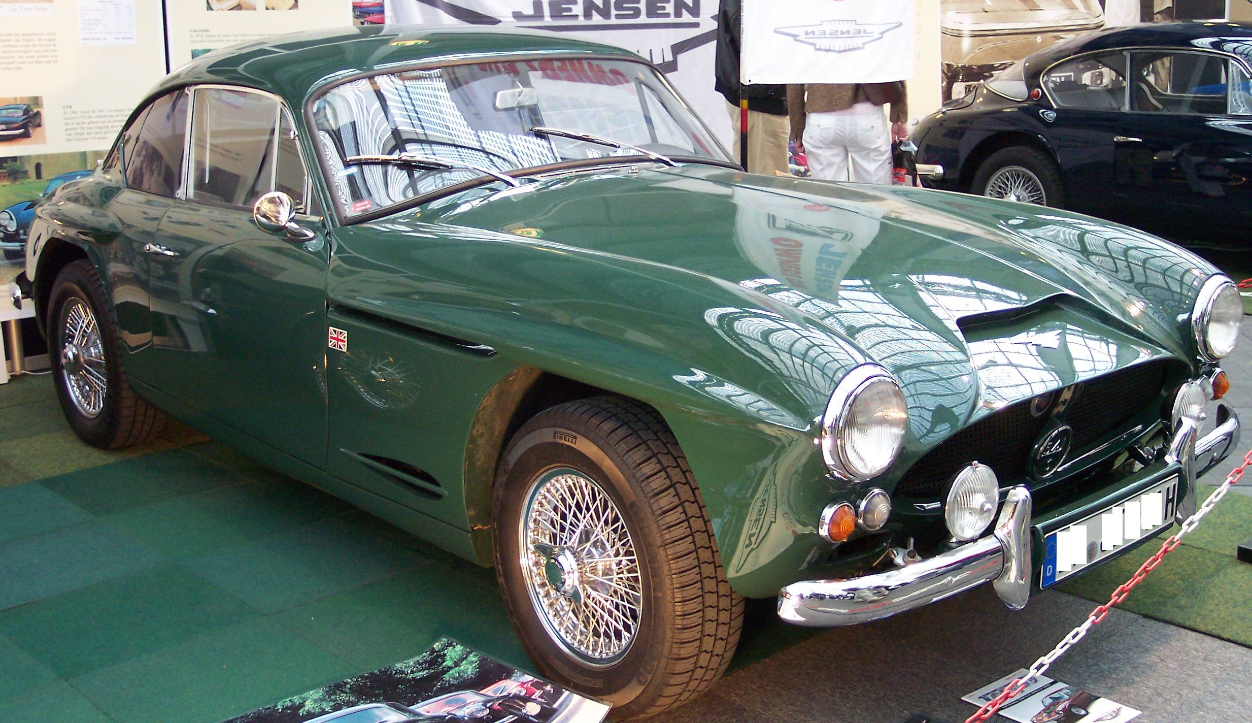 Jensen 541 S